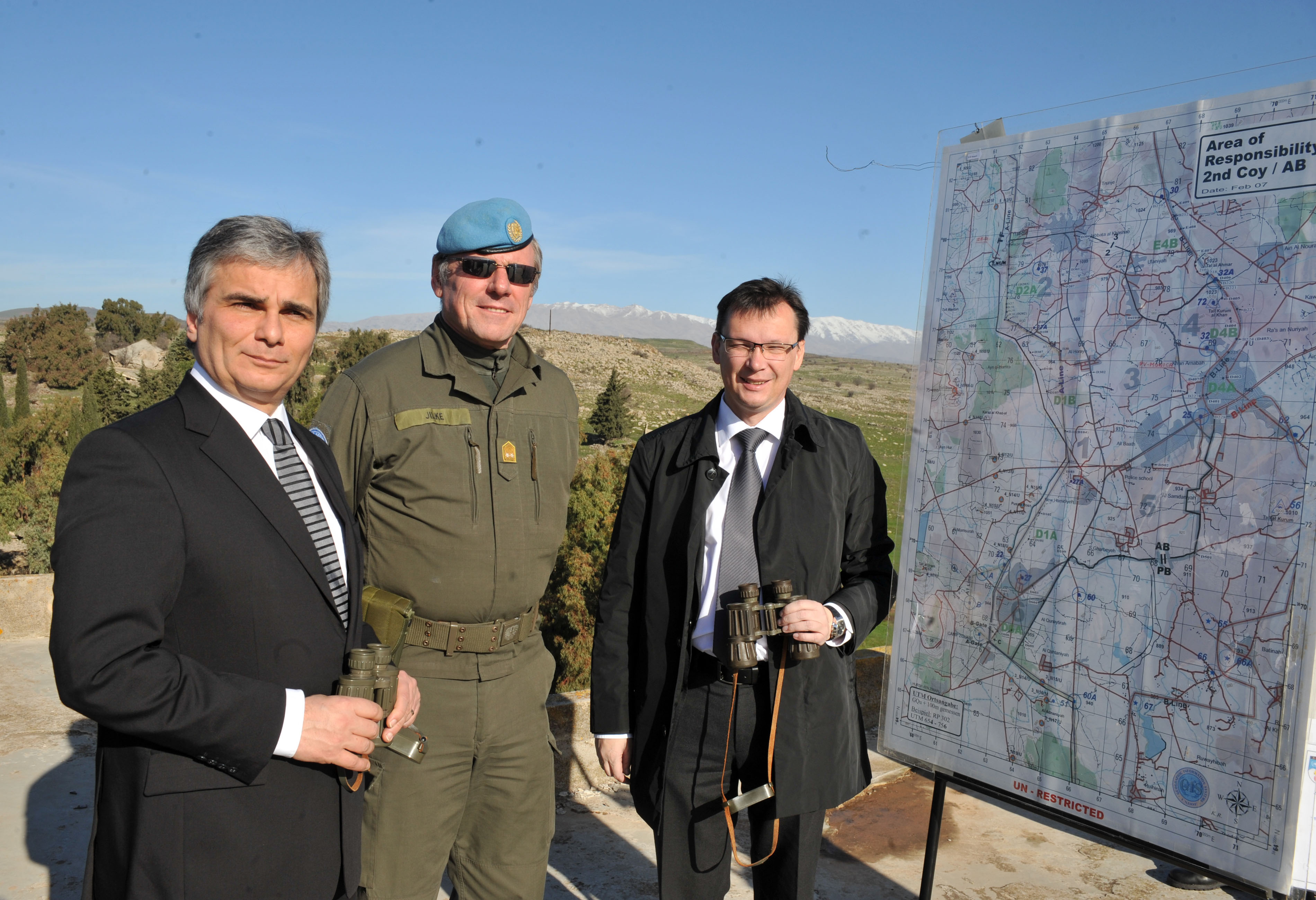 Mittwoch, den 23. Dezember2009 besuchten Österreichs Bundeskanzler Werner Faymann und Verteidigungsminister Norbert Darabos die österreichischen UNO-Truppen am Golan, Syrien aus Anlass des bevorstehenden Weihnachtsfestes. FOTO: HOPI-MEDIA / BERNHARD J. HOLZNER